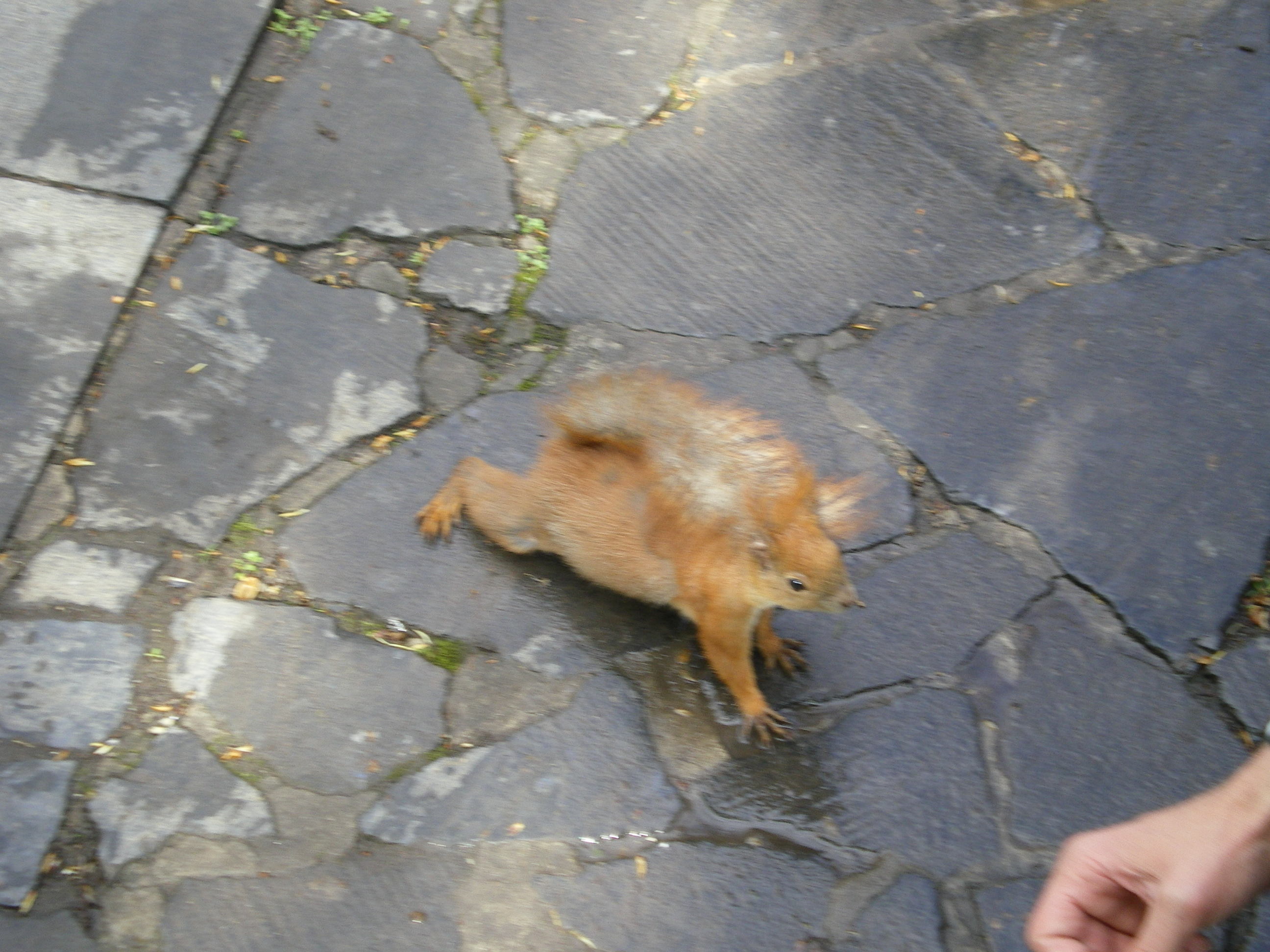 Любая белка любит орехи. Мемориал. Белка обыкновенная (векша), 9 мая 2007.